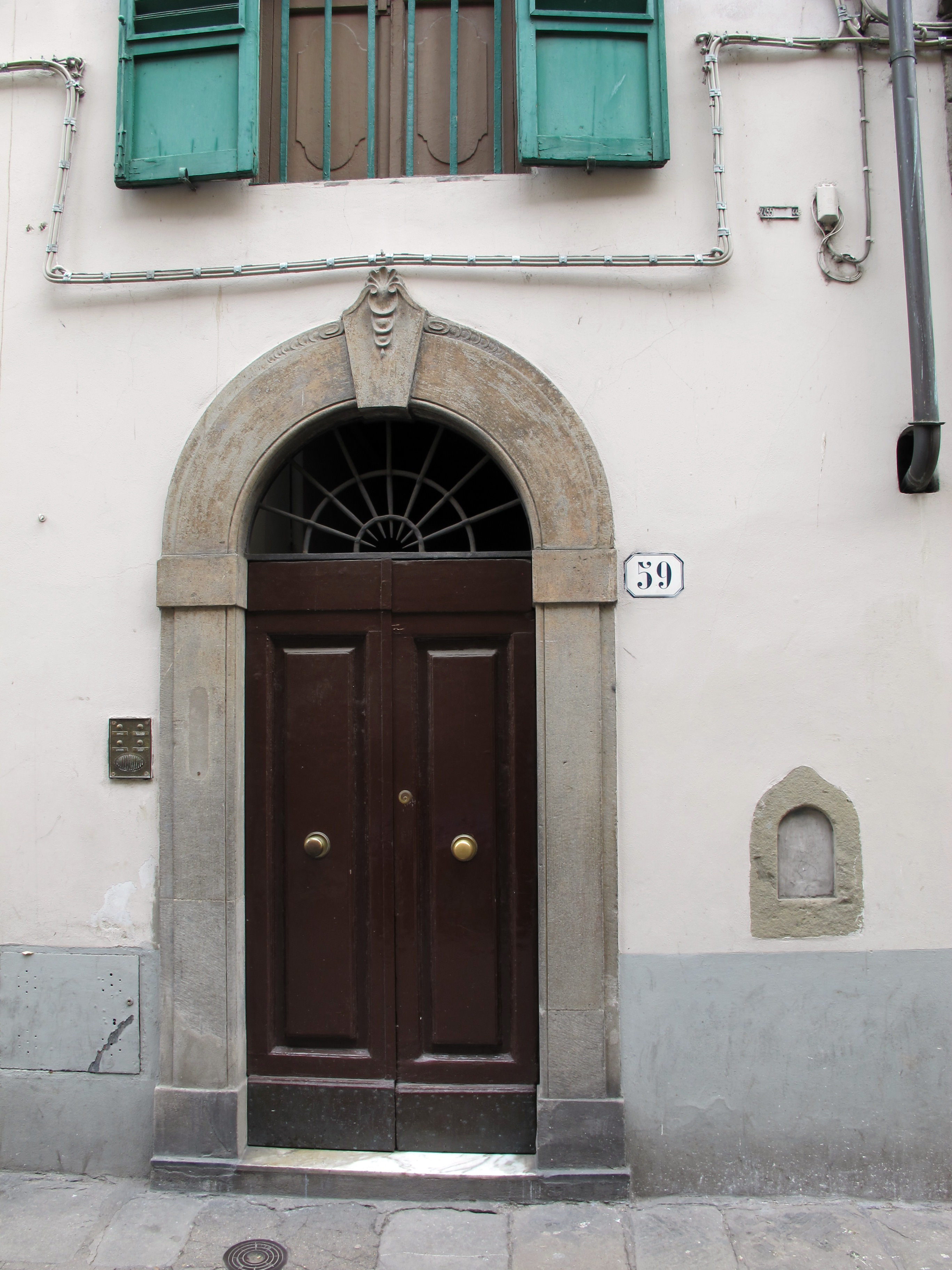 Borgo la croce 59, buchetta del vino